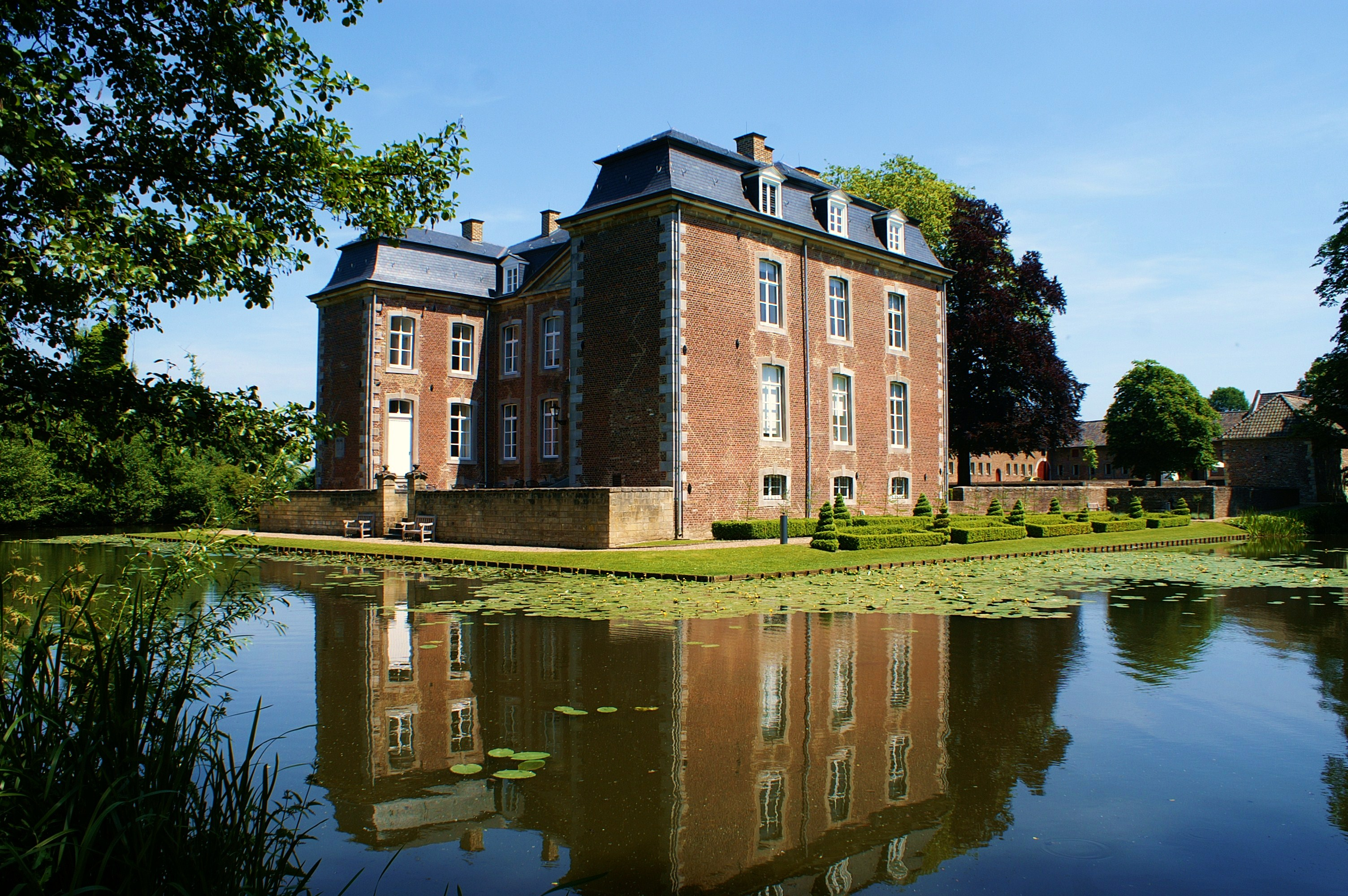 Het betreft hier de achterzijde van kasteel Cortenbach te Voerendaal.